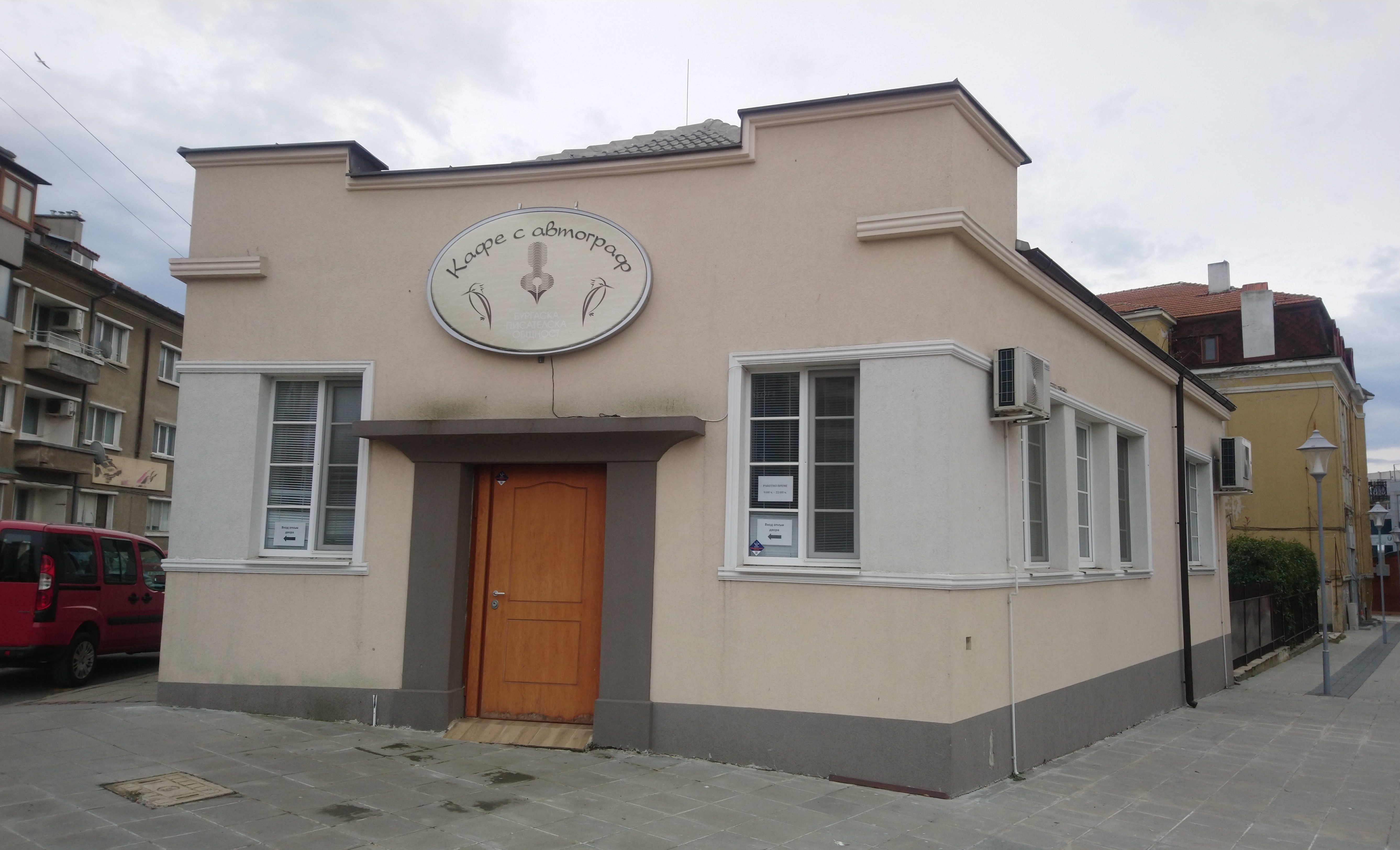 Дом на писателя, Бургас